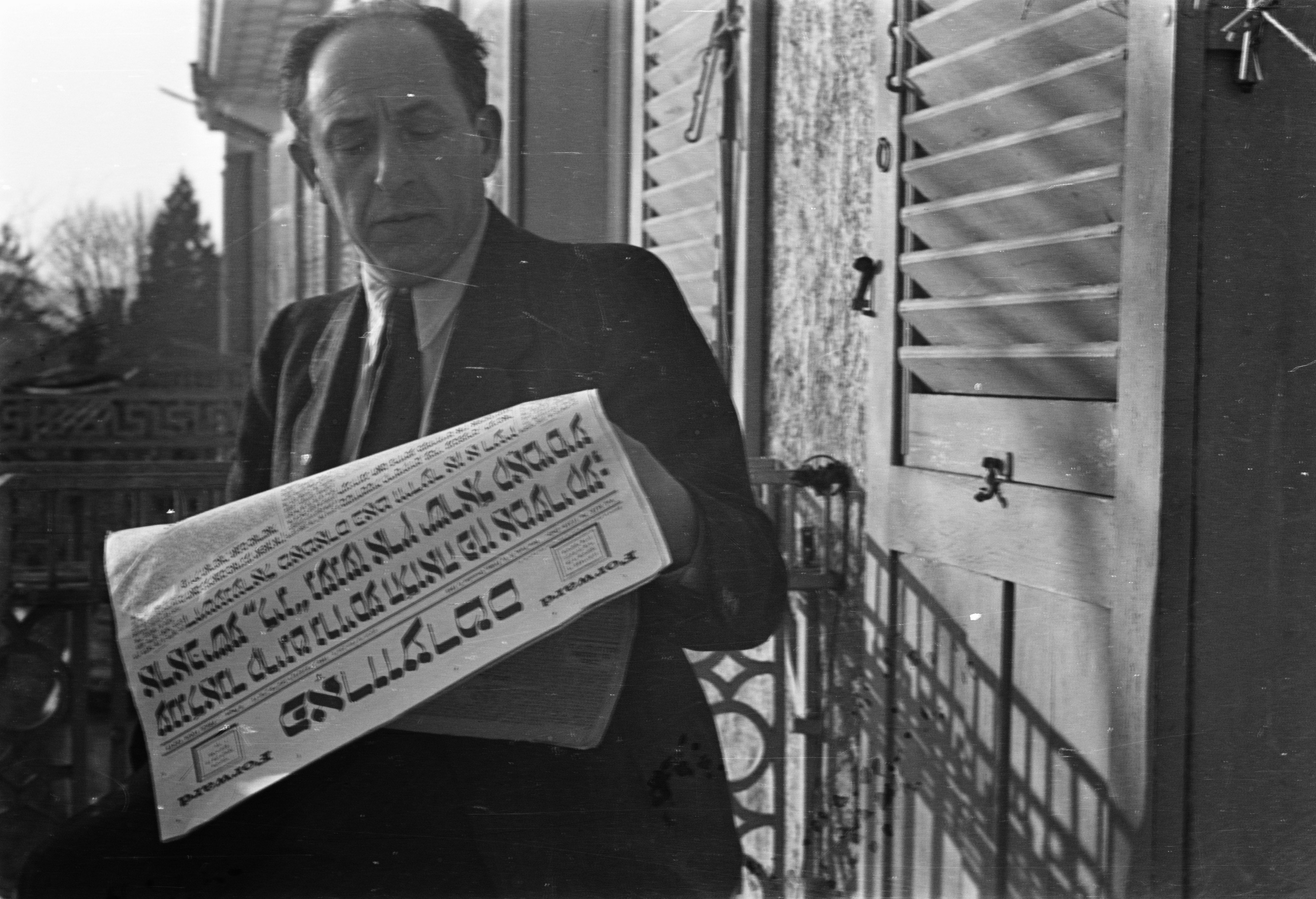 Collectie / Archief : Fotocollectie Anefo Reportage / Serie : [ onbekend ] Beschrijving : Tehuis in Duitsland voor Joodse mensen, die ontslagen zijn uit concentratiekampen en dergelijke Datum : 11 maart 1946 Locatie : Duitsland Trefwoorden : CONCENTRATIEKAMPEN, MENSEN, ONTSLAGEN Fotograaf : Jozefson, […] / Anefo Auteursrechthebbende : Nationaal Archief Materiaalsoort : Negatief (zwart/wit) Nummer archiefinventaris : bekijk toegang 2.24.01.05 Bestanddeelnummer : 901-5575